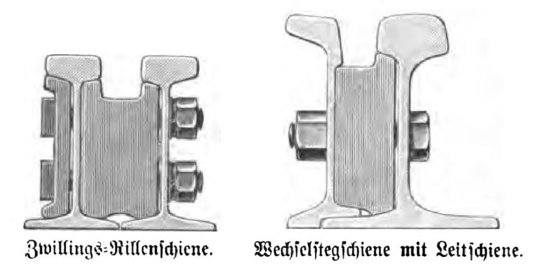 Haarmann’sche Zwillings- und Drillingsschiene (retuschiert)